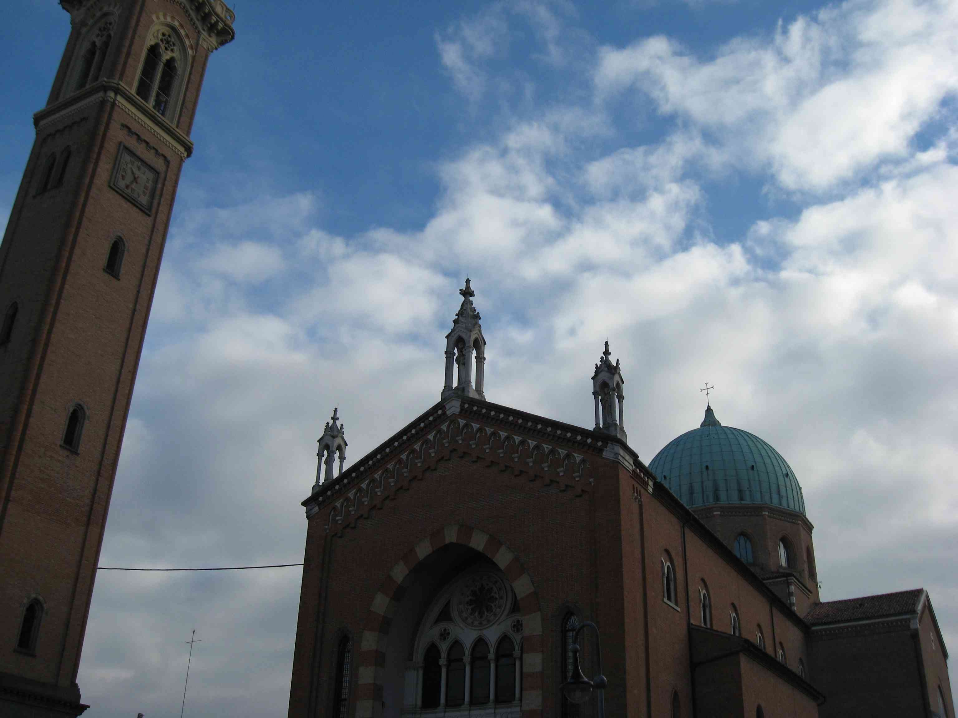 S. Antonino Padova